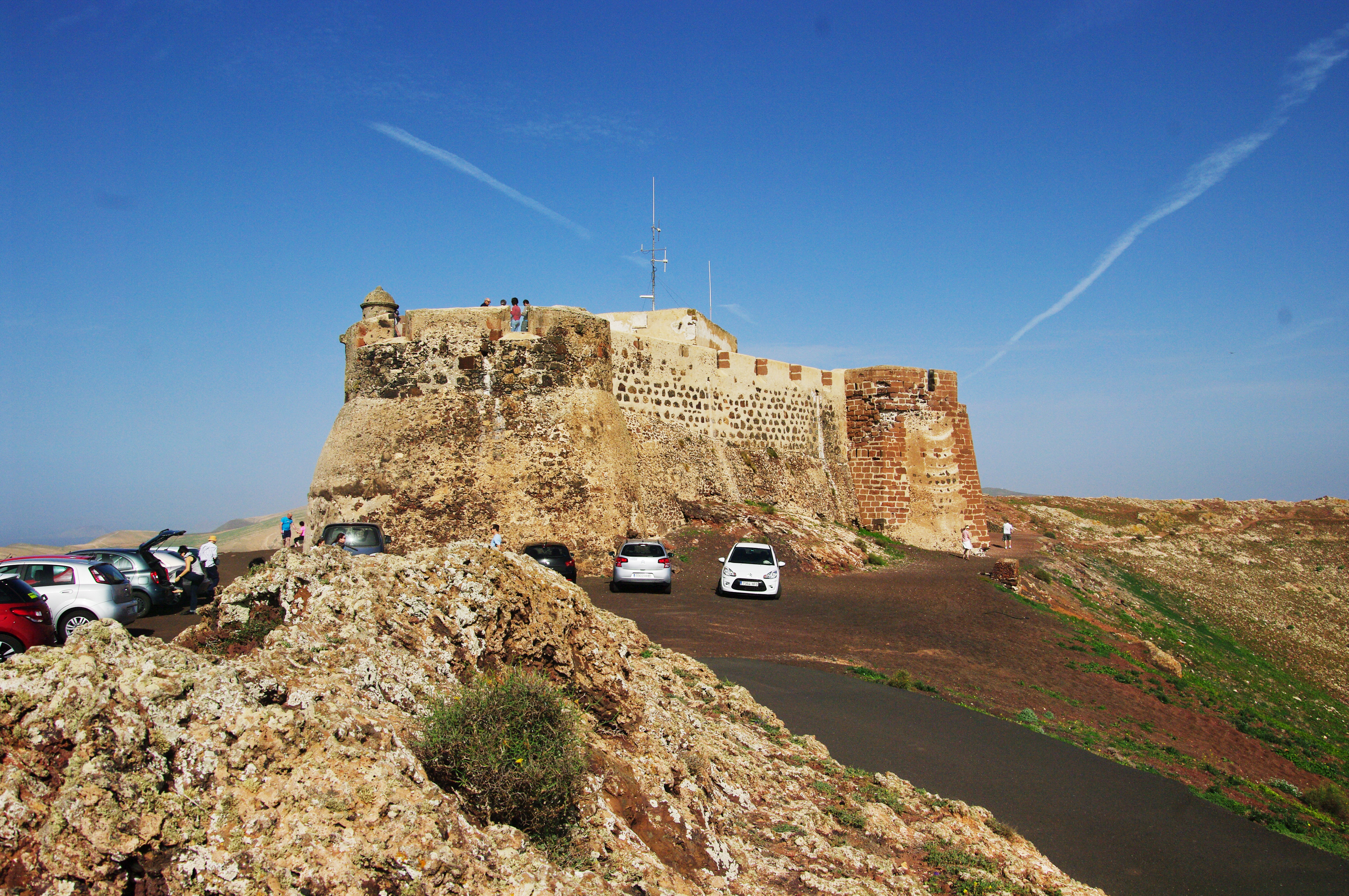 Castillo de Guanapay